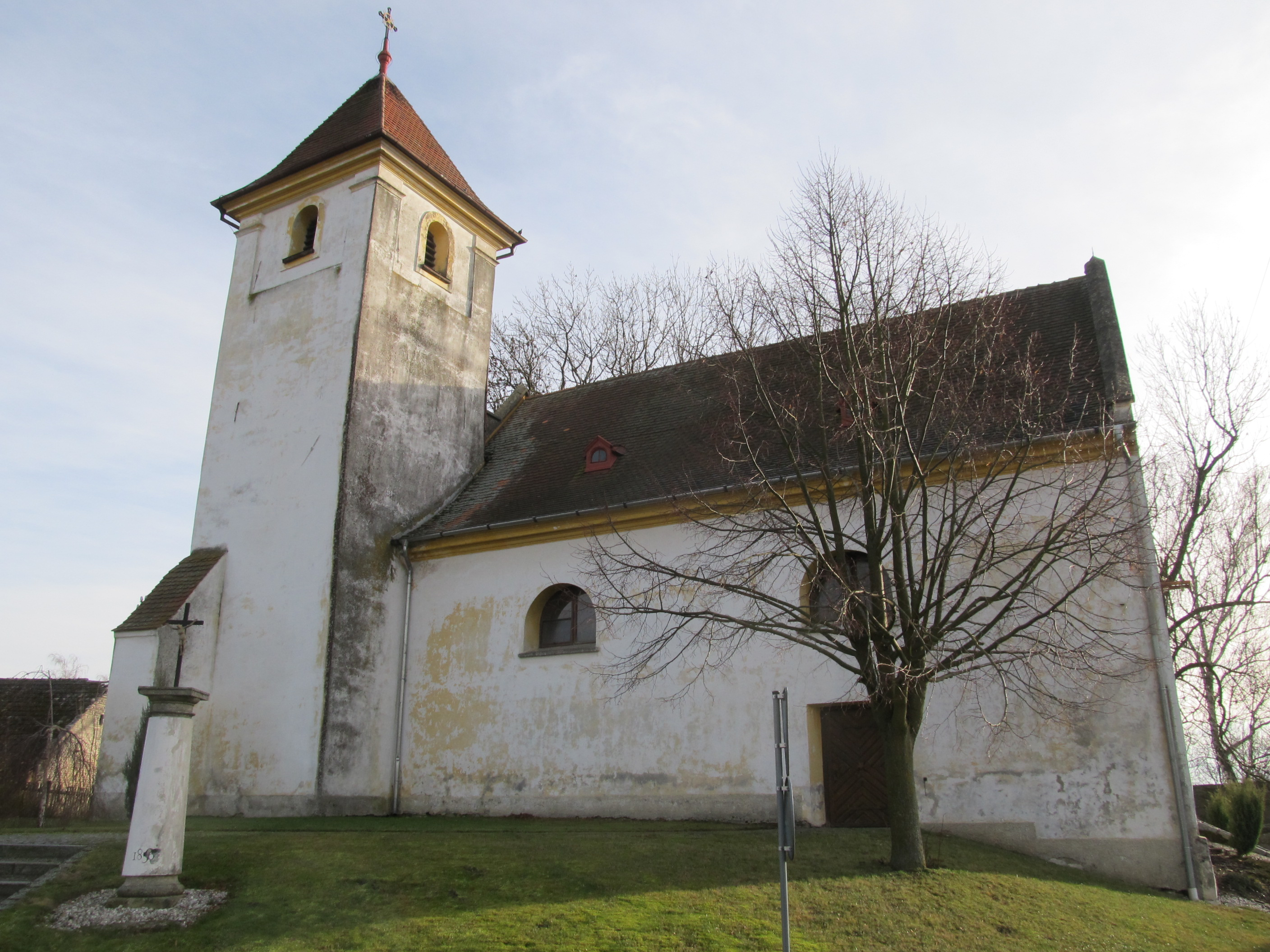 Běhařov - kostel sv. Prokopa